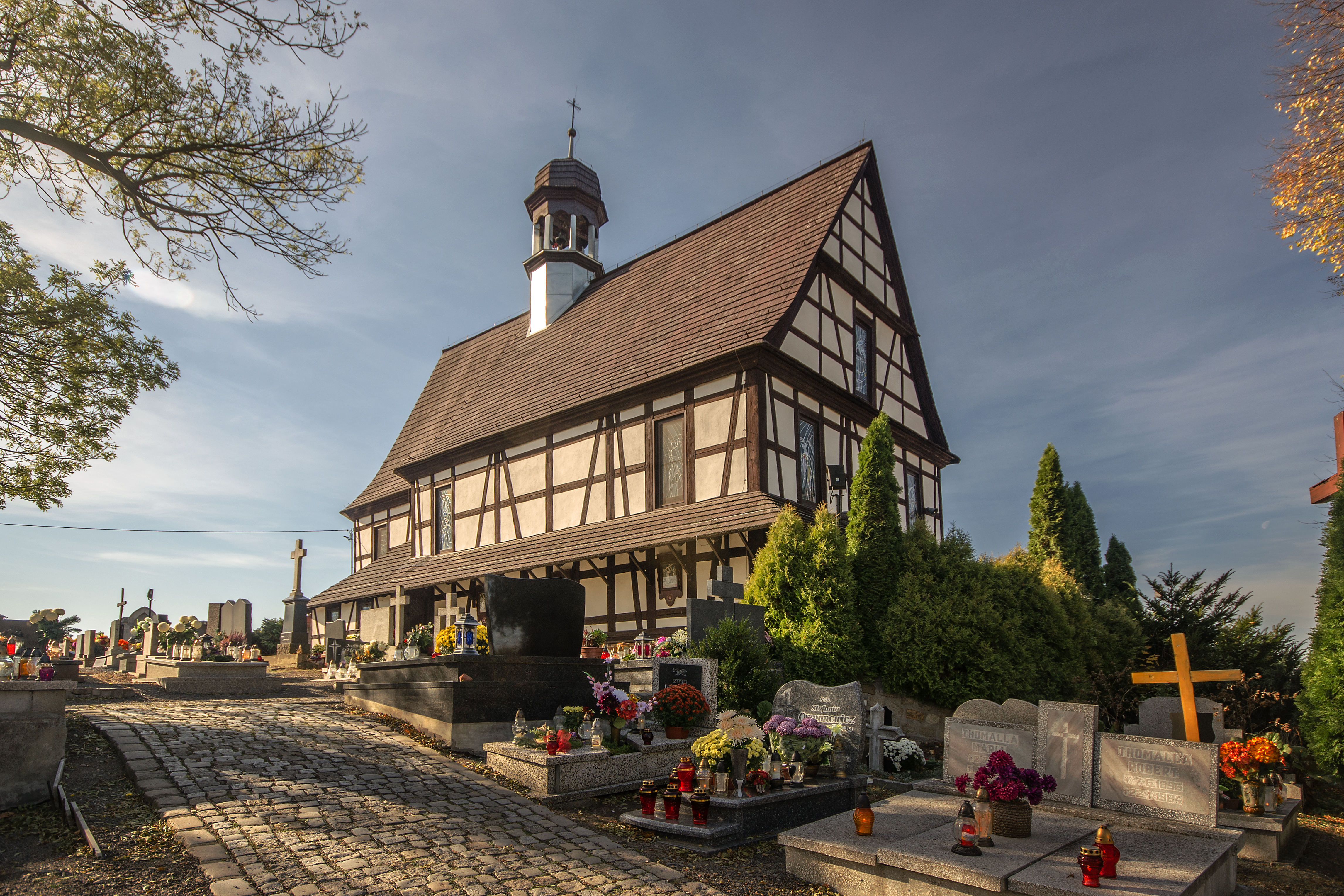 Głogówek, kościół cmentarny pw. Św. Krzyża, 1705